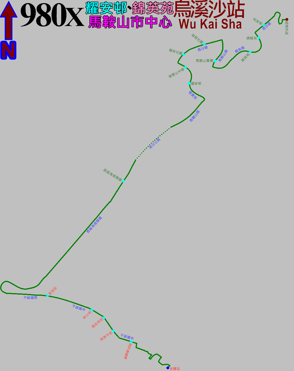 中文（香港）: 過海隧巴980X線黃昏班次的走線圖